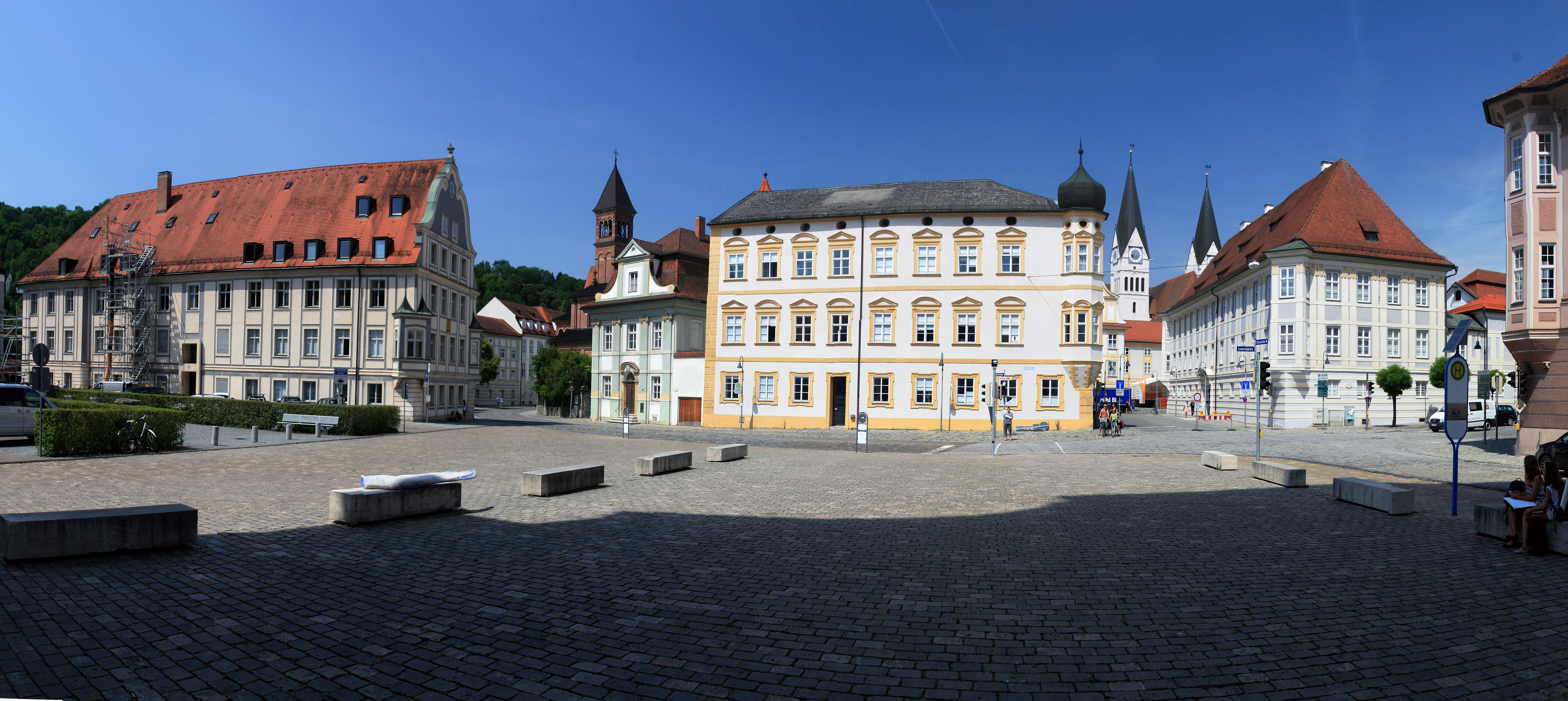 Eichstätt